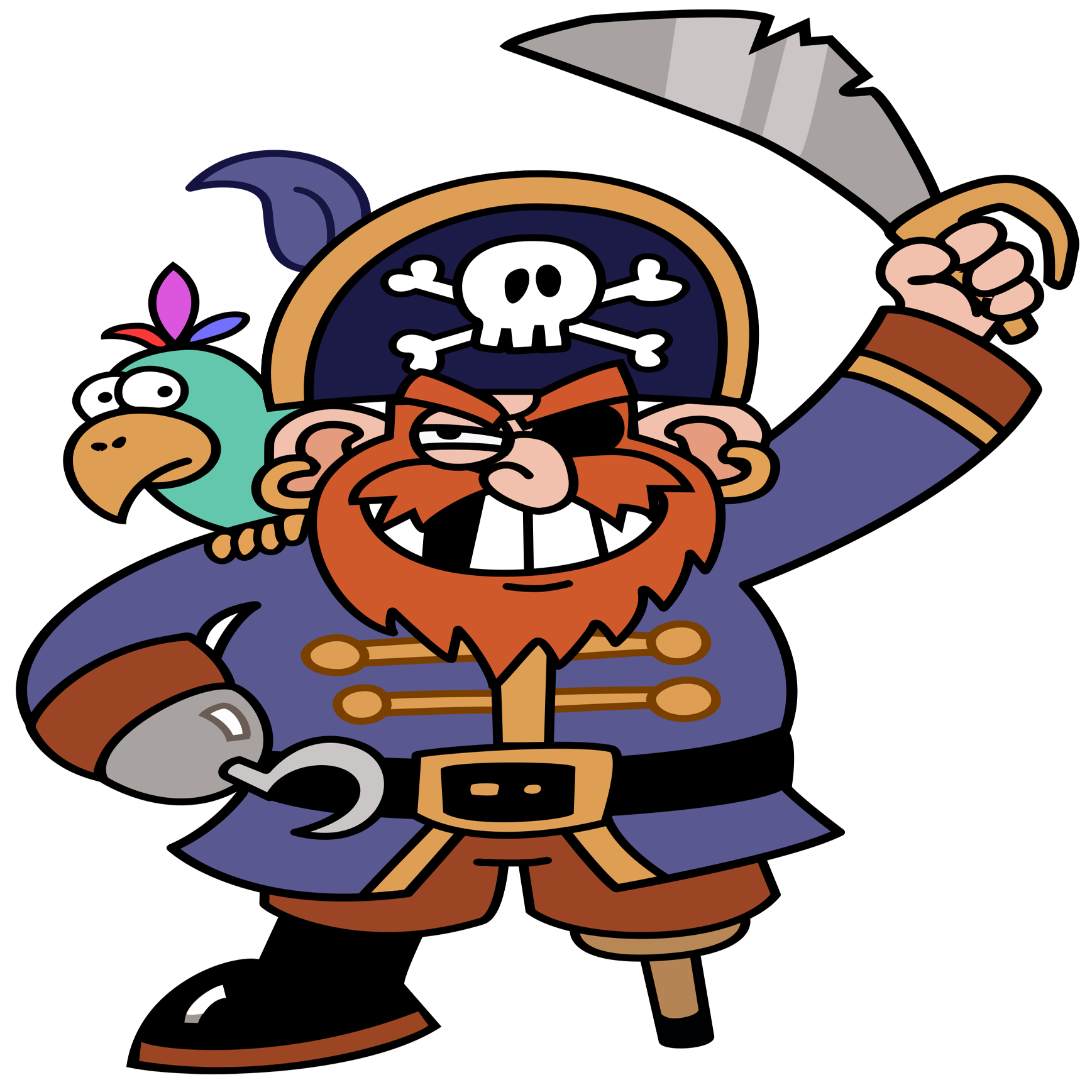 redimensionnement du fichier d'origine